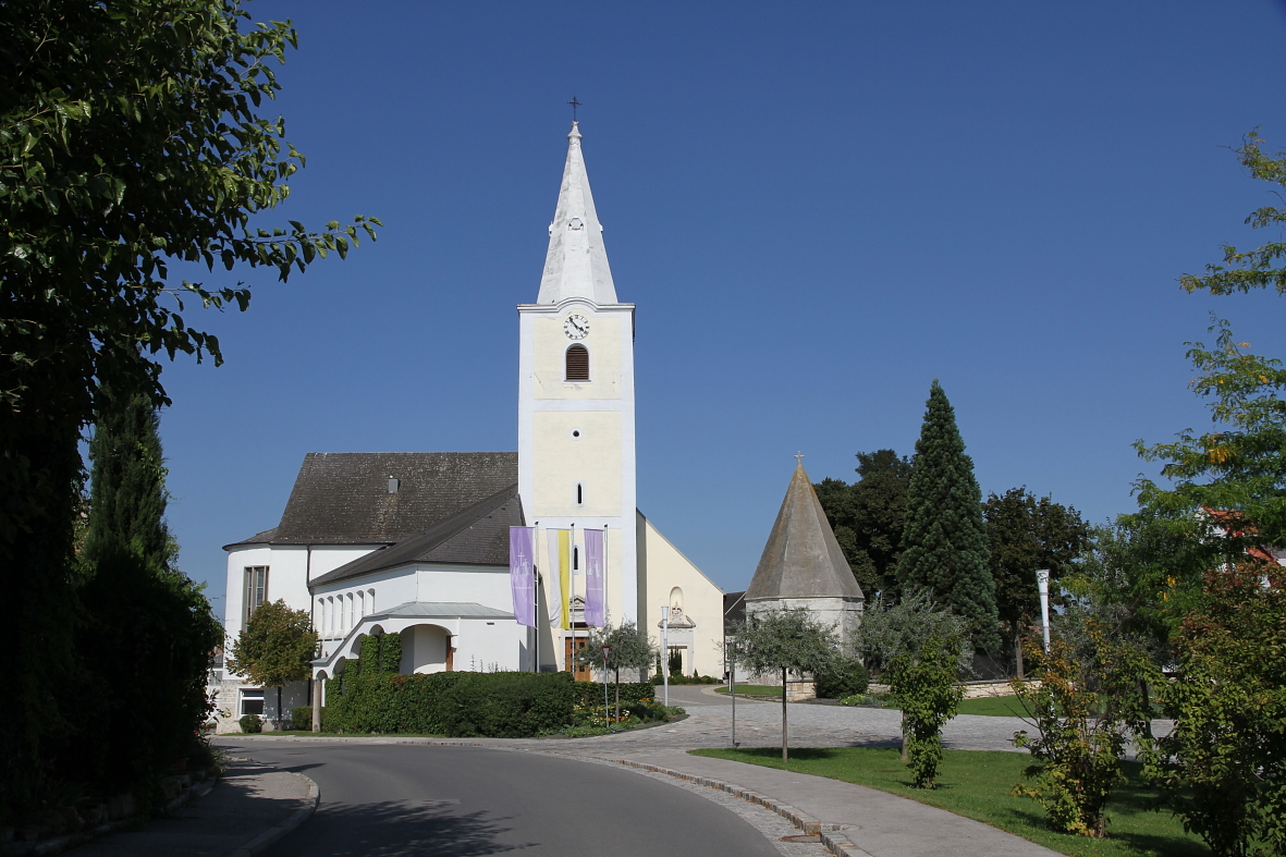 Die kath. Pfarrkirche hl. Johannes d. Täufer in der burgenländischen Marktgemeinde Sankt Margarethen im Burgenland.